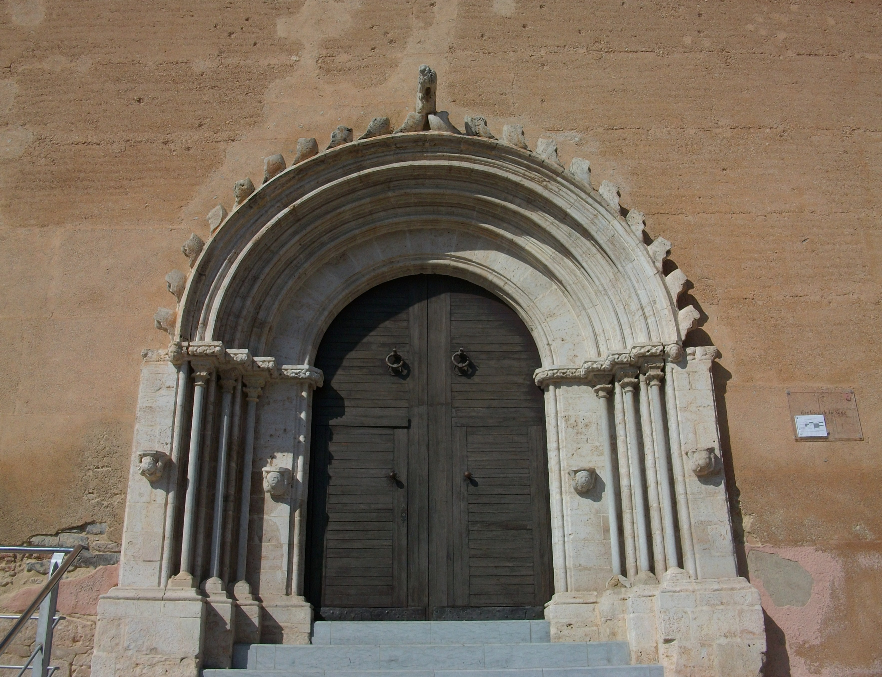 Portada de l'església de la Sang de Llíria.